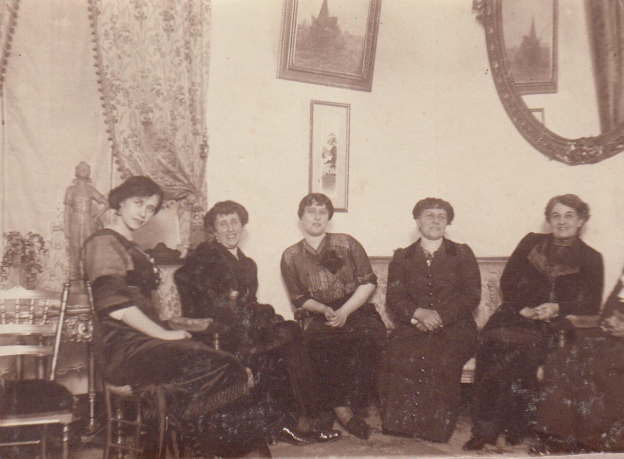 Estas son las hijas de Vicente Correa Albano y Agustina Vergara Lois. En su casa en Santiago de Chile, calle Huérfanos en el año de 1900. Esta fotografía se encuentra en álbum familiar. Están el la fotografía : Susana, Mercedes, Matilde, Sara y Ana.